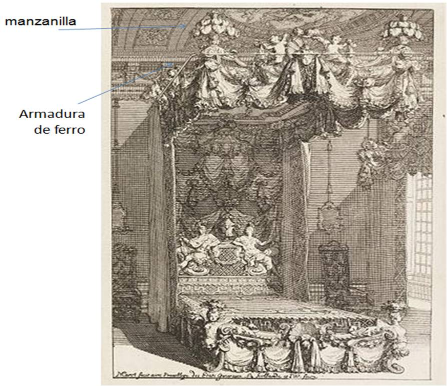 Llit